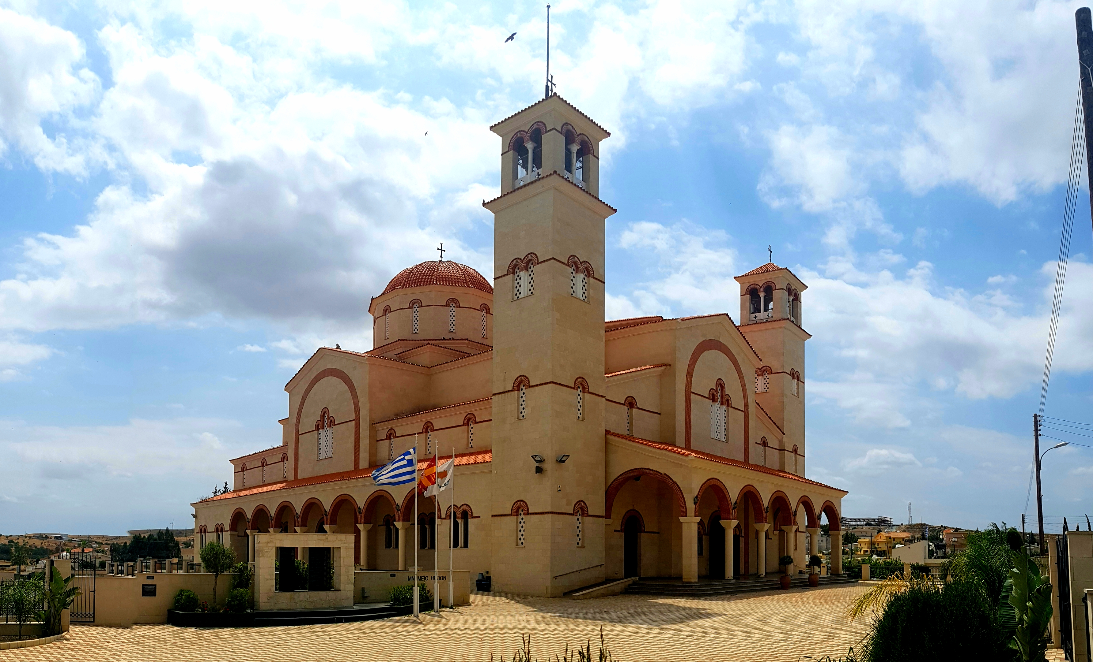 Ιερός Ναός Αγίου Επιφανίου στο χωριό Λύμπια, Επαρχίας Λευκωσίας.